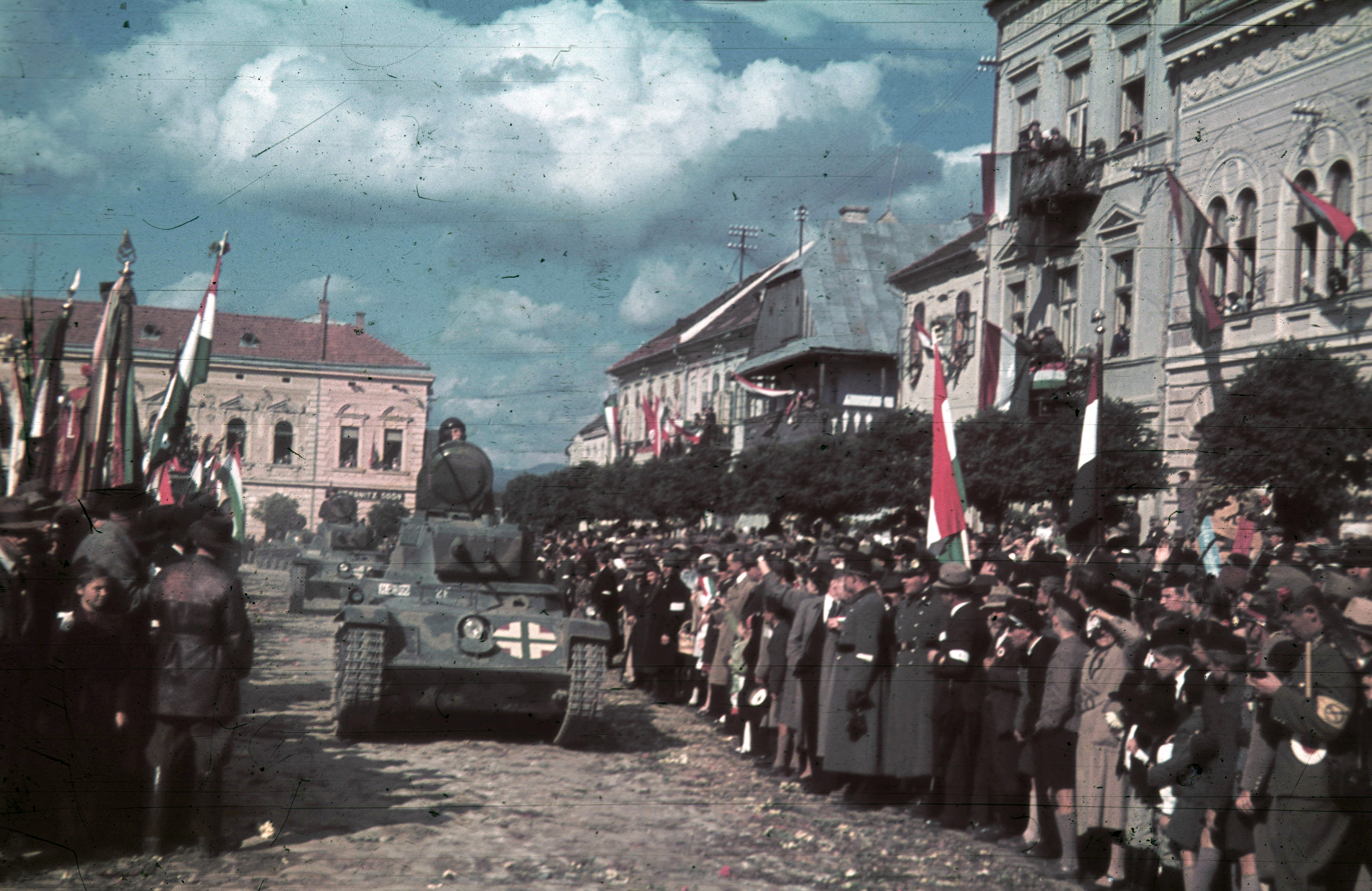 Kézdivásárhely, Gábor Áron tér a magyar csapatok bevonulása idején, szemben a Malom utca. A felvétel 1940. szeptember 13-án készült Location: Romania, Transylvania, Targu Secuiesc Tags: colorful, territorial gain, flag, tank Title: Gábor Áron tér a magyar csapatok bevonulása idején, szemben a Malom utca. A felvétel 1940. szeptember 13-án készült